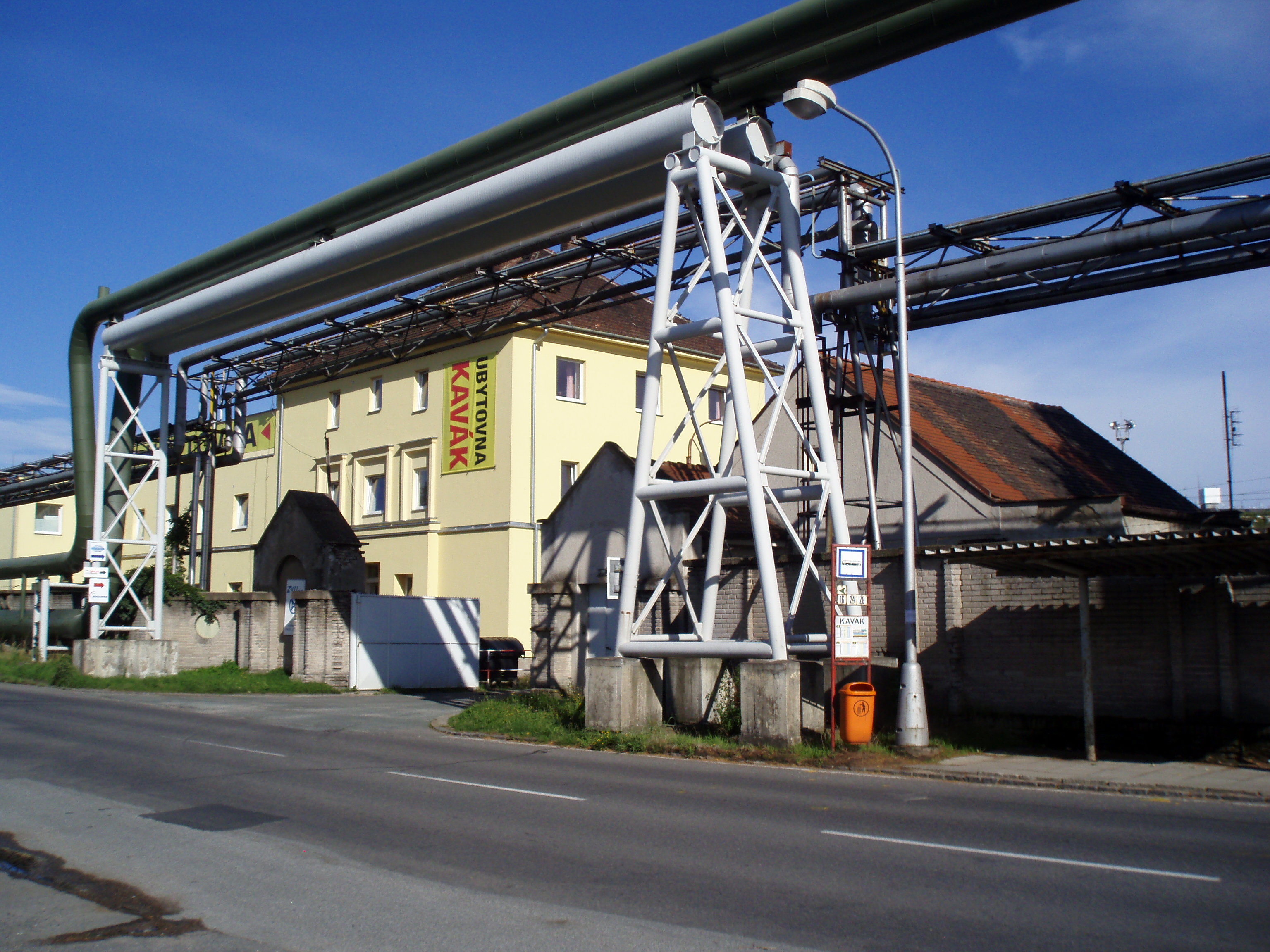 Areál ZVU, bývalých Závodů Vítězného února